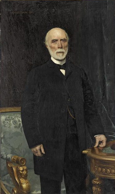 Charles-Louis de Saulces de Freycinet (1828-1923)